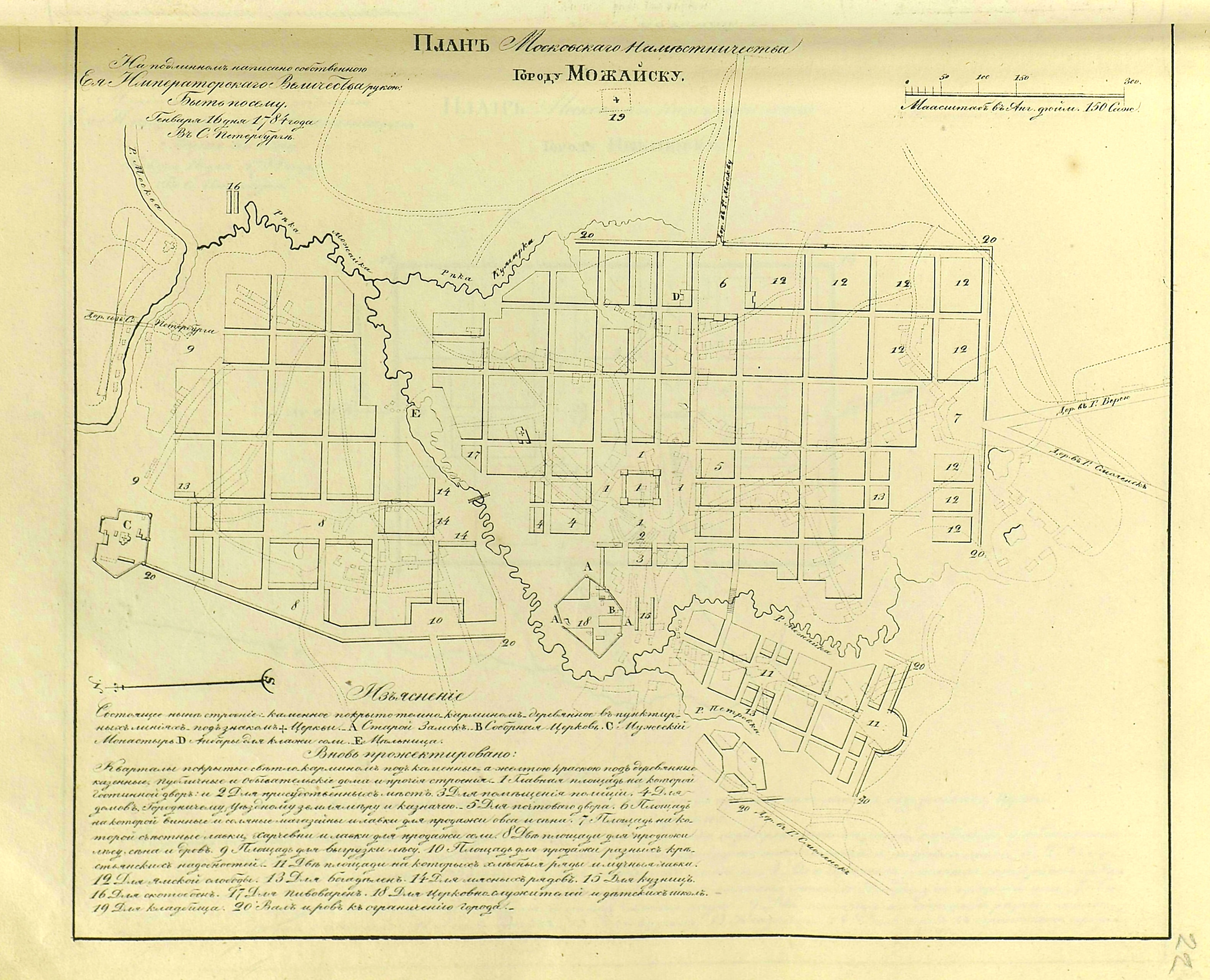 План Московского Наместничества Городу Можайску.